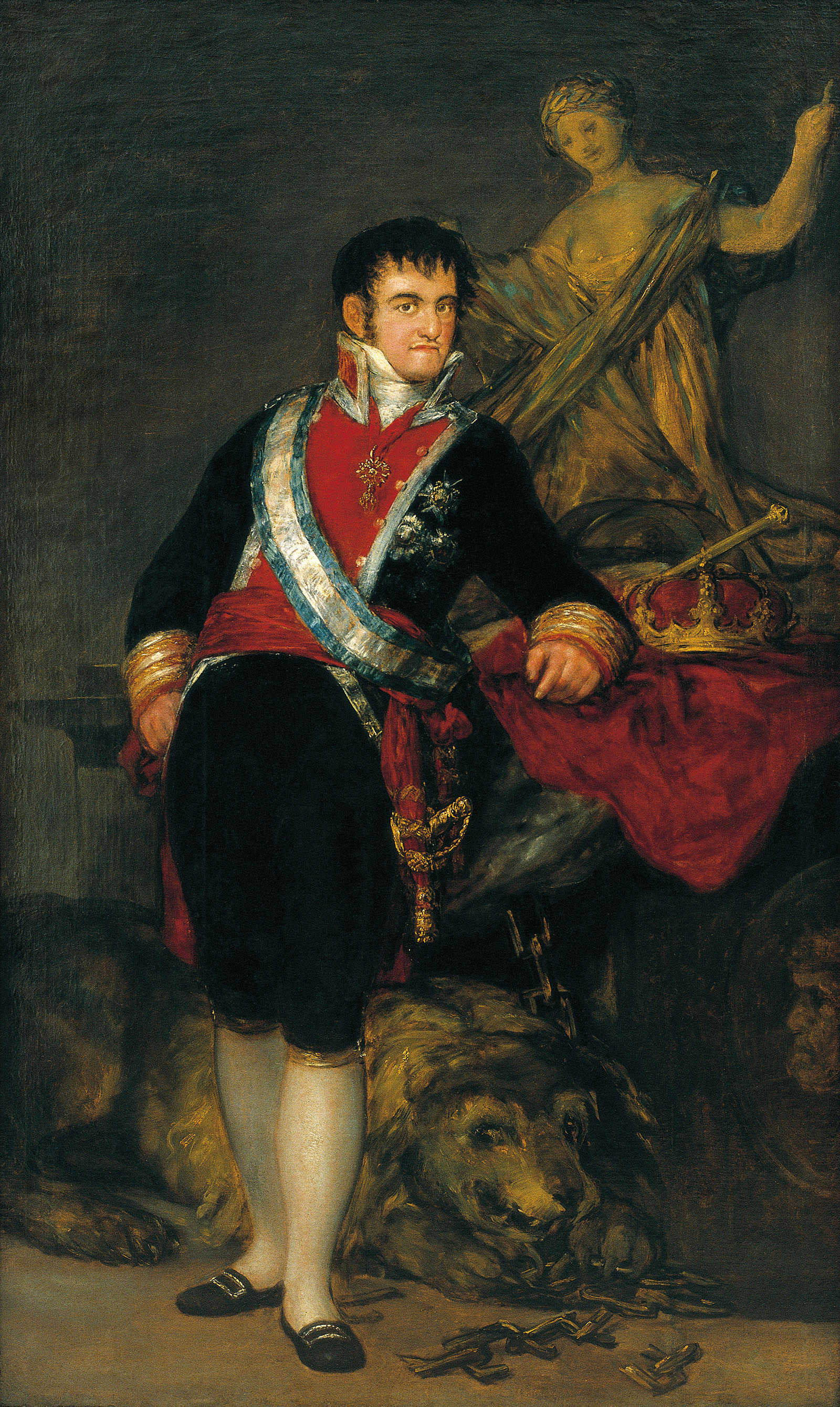 Retrato del rey Fernando VII de España (1784-1833), hijo y sucesor del rey Carlos IV de España.